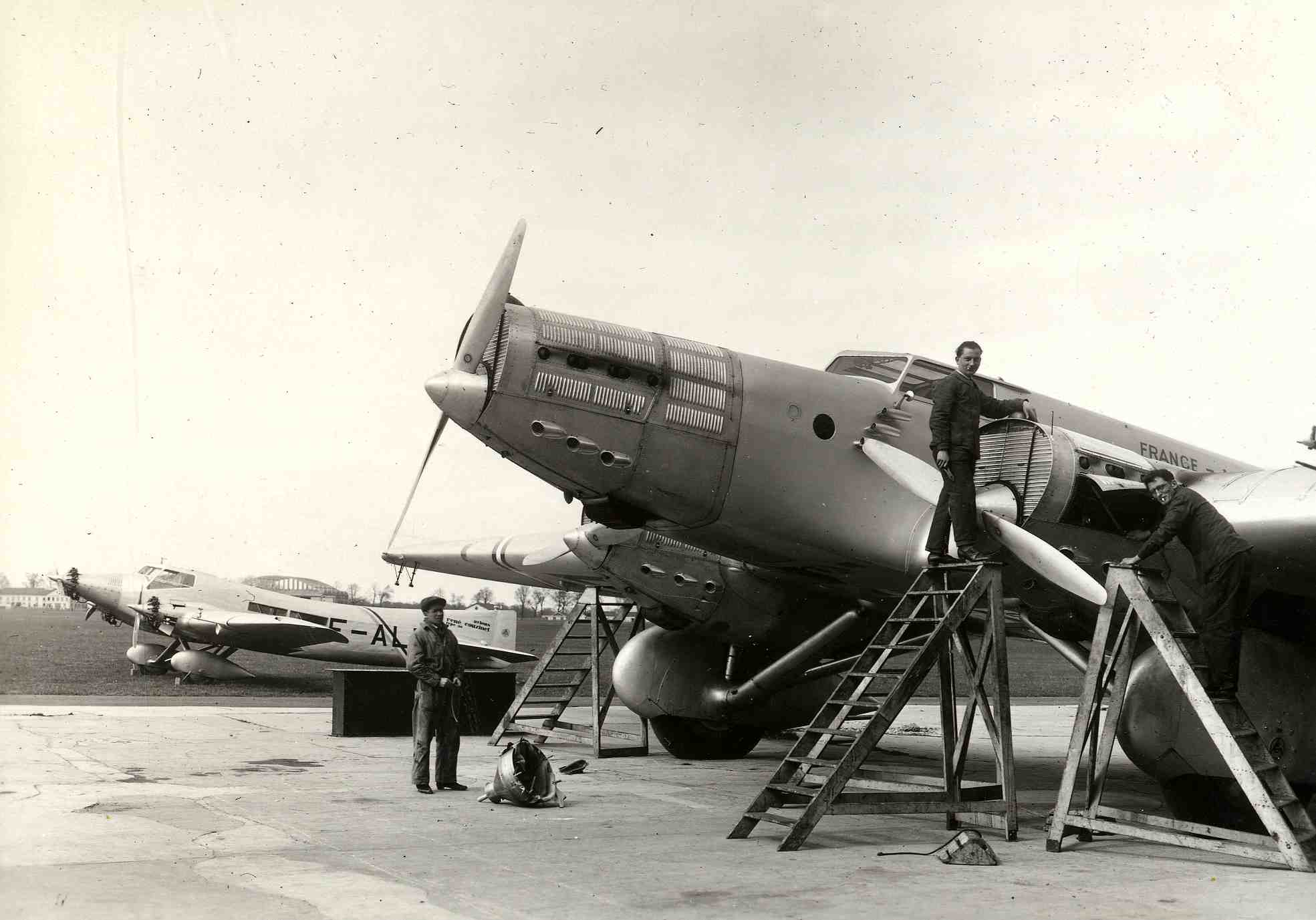 Avion Couzinet70 au parking